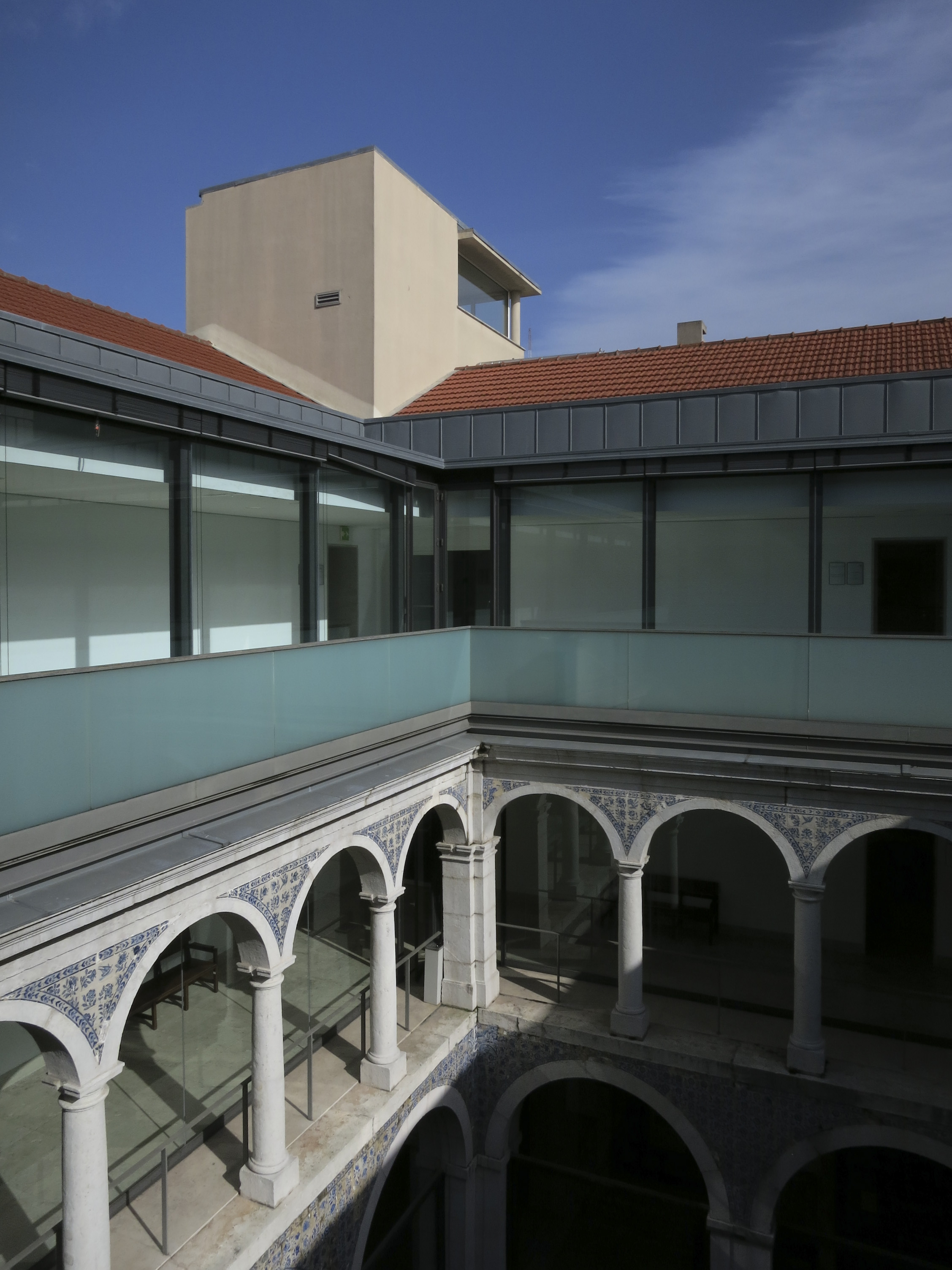 Instituto Superior de Economia e Gestão, Lisboa; Arq. Gonçalo Byrne